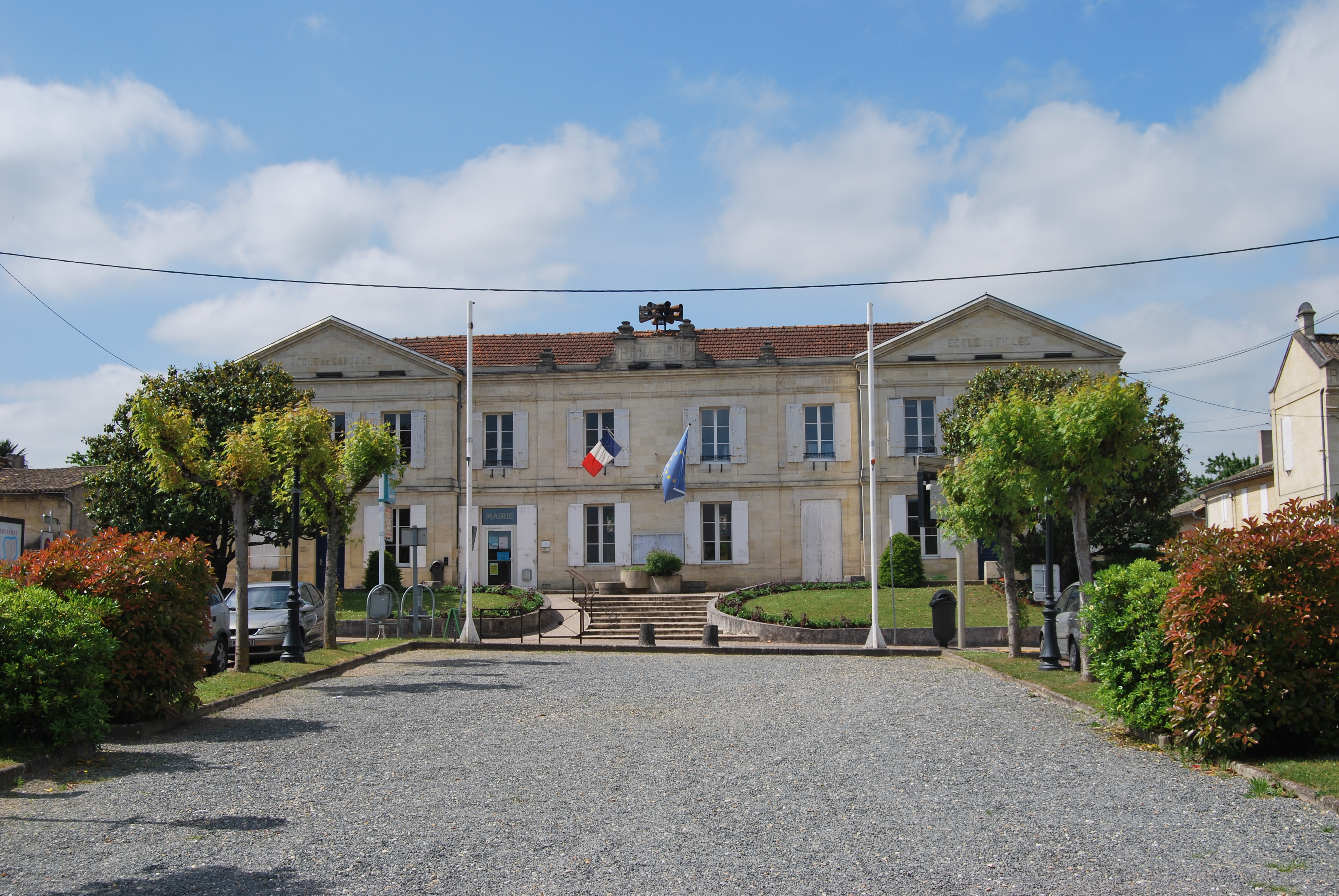 Arveyres Mairie